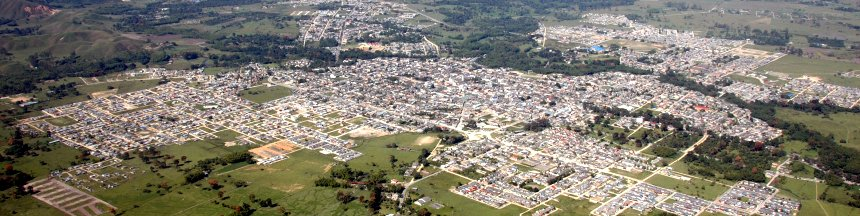 Panoramica de la ciudad de pitalito... toma aerea